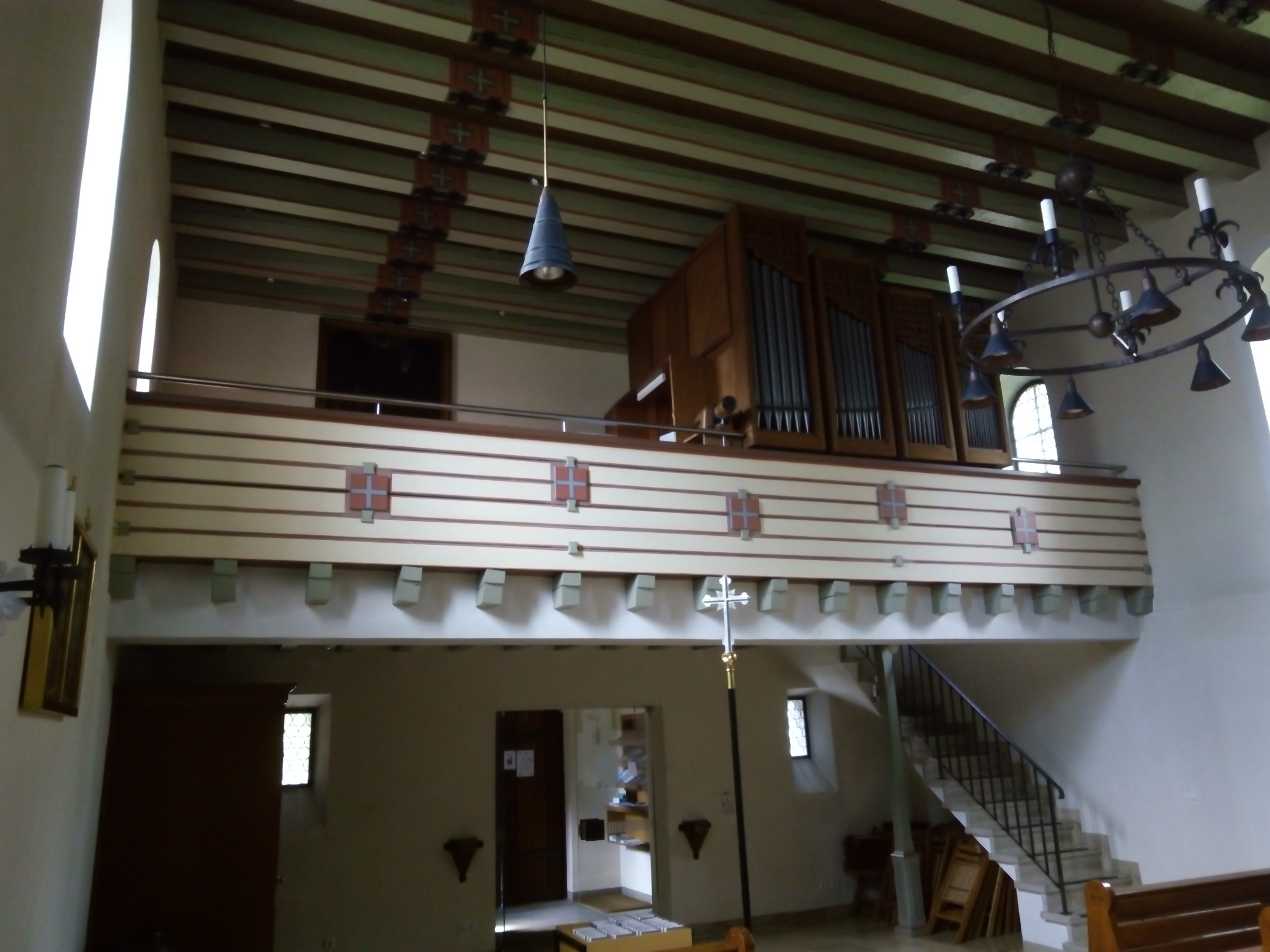 Blick zur Westempore mit Orgel, Maria Immaculata Weißenstadt